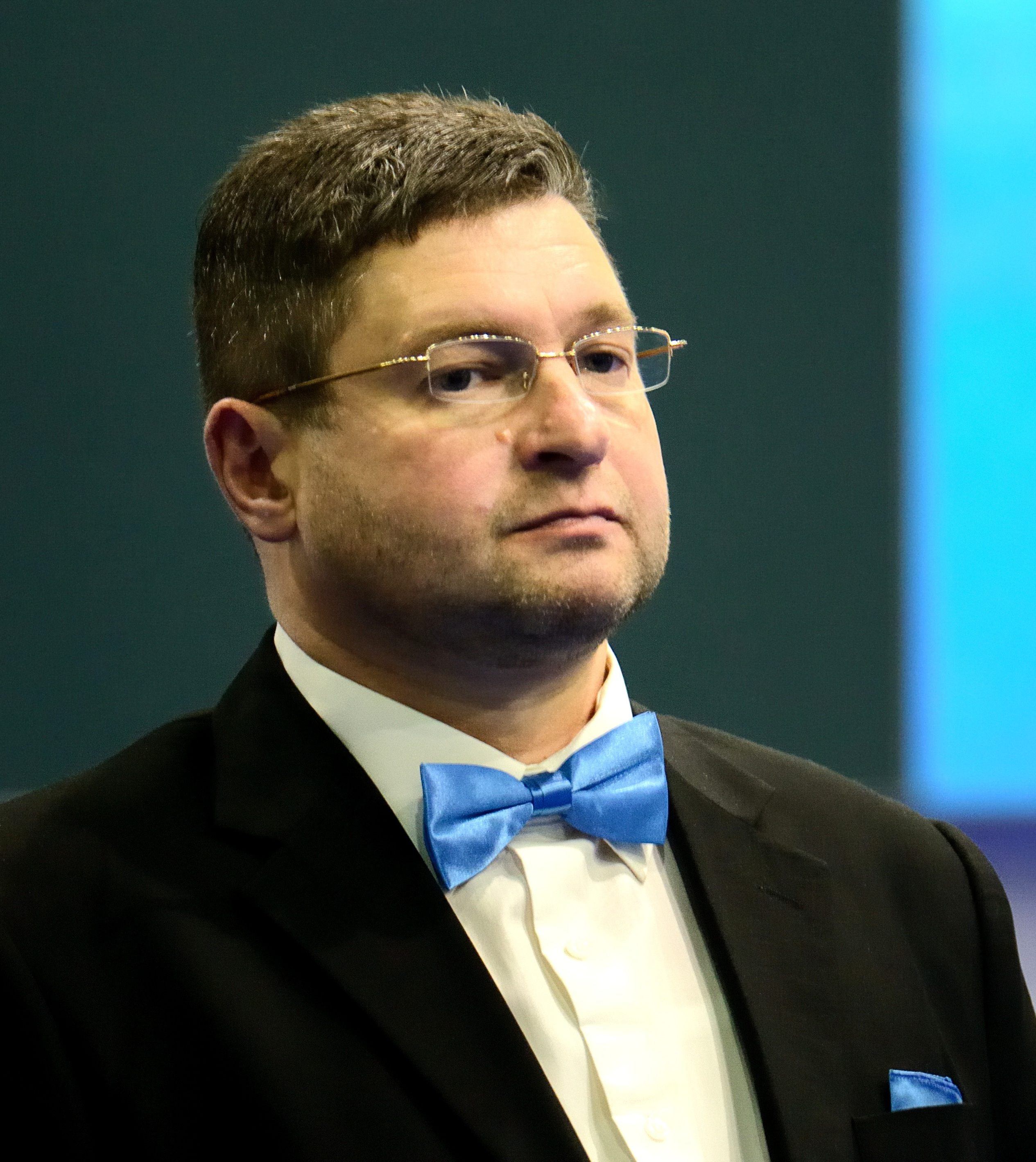 Писатель, ученый, журналист Антон Антонович Антонов-Овсеенко.